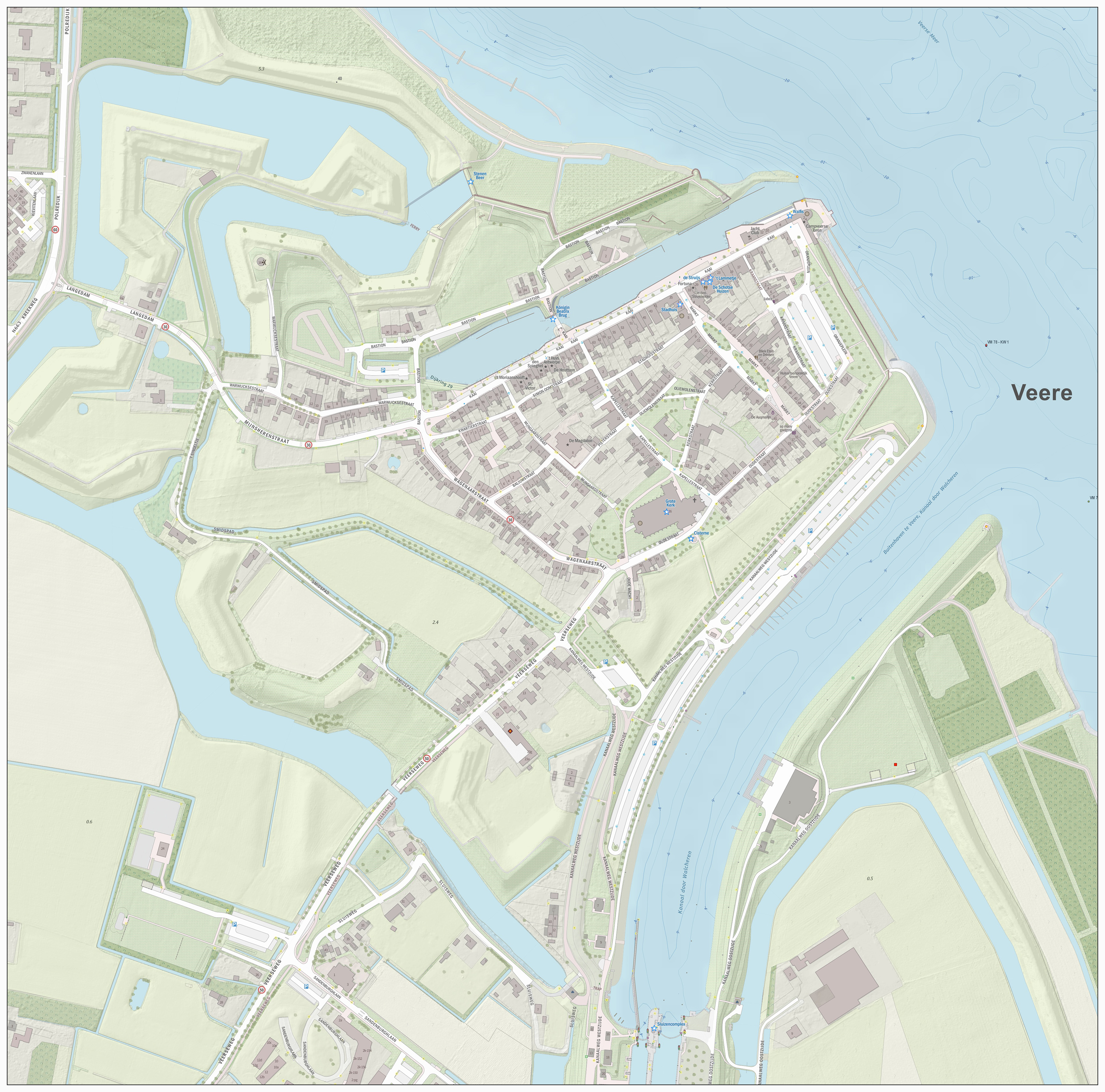 Topografische kaart van Veere (centrum van woonplaats). Resolutie: 2688 pixels/km. Kaartbeeld samengesteld uit de open geodata van de Basisregistratie Grootschalige Topografie (BGT), Creative Commons-BY Kadaster, en Top10NL en Top25namen (Basisregistratie Topografie, Kadaster), Creative Commons-BY Kadaster. Gebouwvlakken uit open geodata BAG extract, Creative Commons-BY Kadaster. Wegen uit de OpenStreetMap, CC-BY OpenStreetMap bijdragers. Reliëfschaduw uit de Actuele Hoogtekaart AHN2/AHN3. Samenstelling en kleurenschema: Jan-Willem van Aalst, met QGIS2. Zie ook de Legenda.